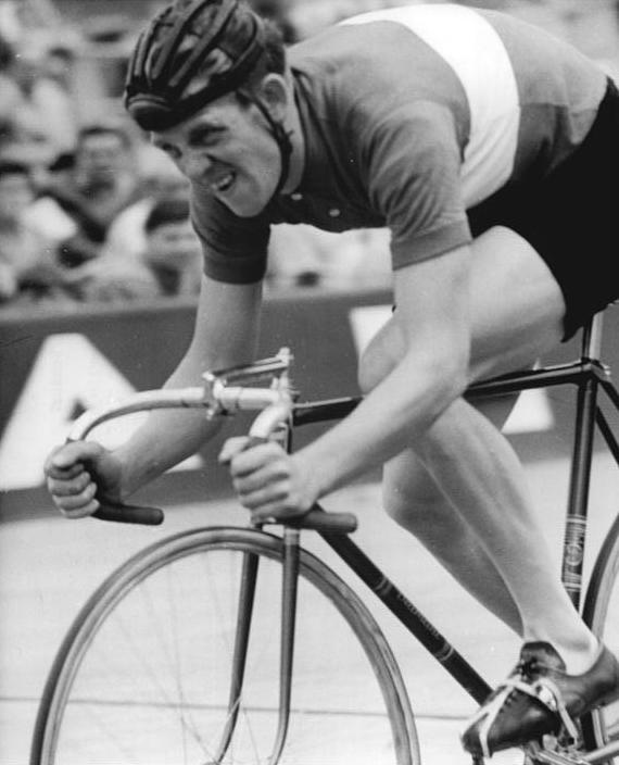 Zentralbild / Wendorf / 10.8.1961 / Ks-Noa / SC Einheit Berlin siegte im 4000 m-Mannschaftsfahren Für die herausragende Leistung bei den deutschen Bahn-Radsport-Meisterschaften auf der Leipziger Alfred-Rosch-Kampfbahn sorgte im 4000 m-Mannschaftszeitfahren der SC Einheit Berlin. Barleben, Köhler, Klieme und Schmelzer fuhren 4.38, 7 Min und holten sich damit den deutschen Meistertitel. Das Finale im 4000 m-Verfolgungsfahren gewann Franz (SC Motor Karl-Marx-Stadt). UBz: Franz (SC Motor Karl-Marx-Stadt).